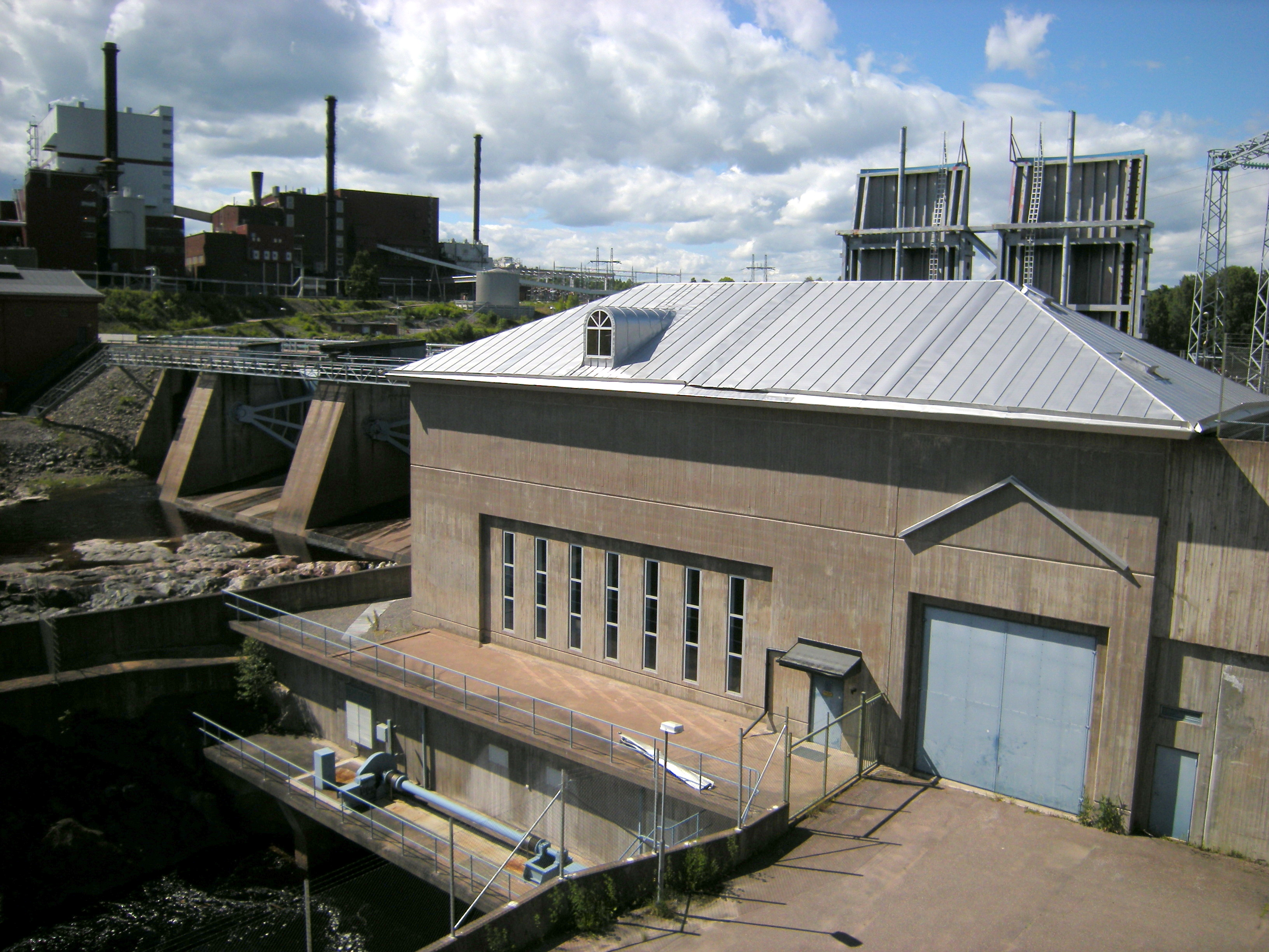 Kvarnsvedens vattenkraftverk, pappersbruket i bakgrunden.